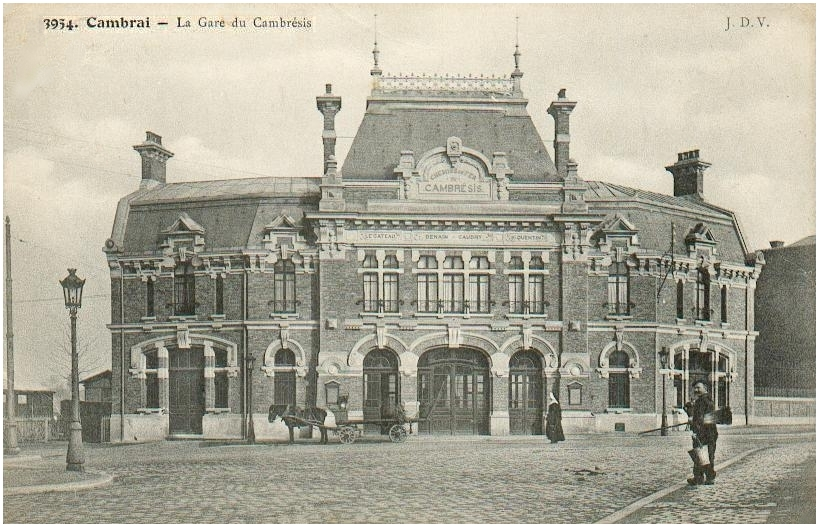 Carte postale ancienne d'éditeur J. D. V. Cambrai - la gare terminus du Chemin de fer du Cambrésis